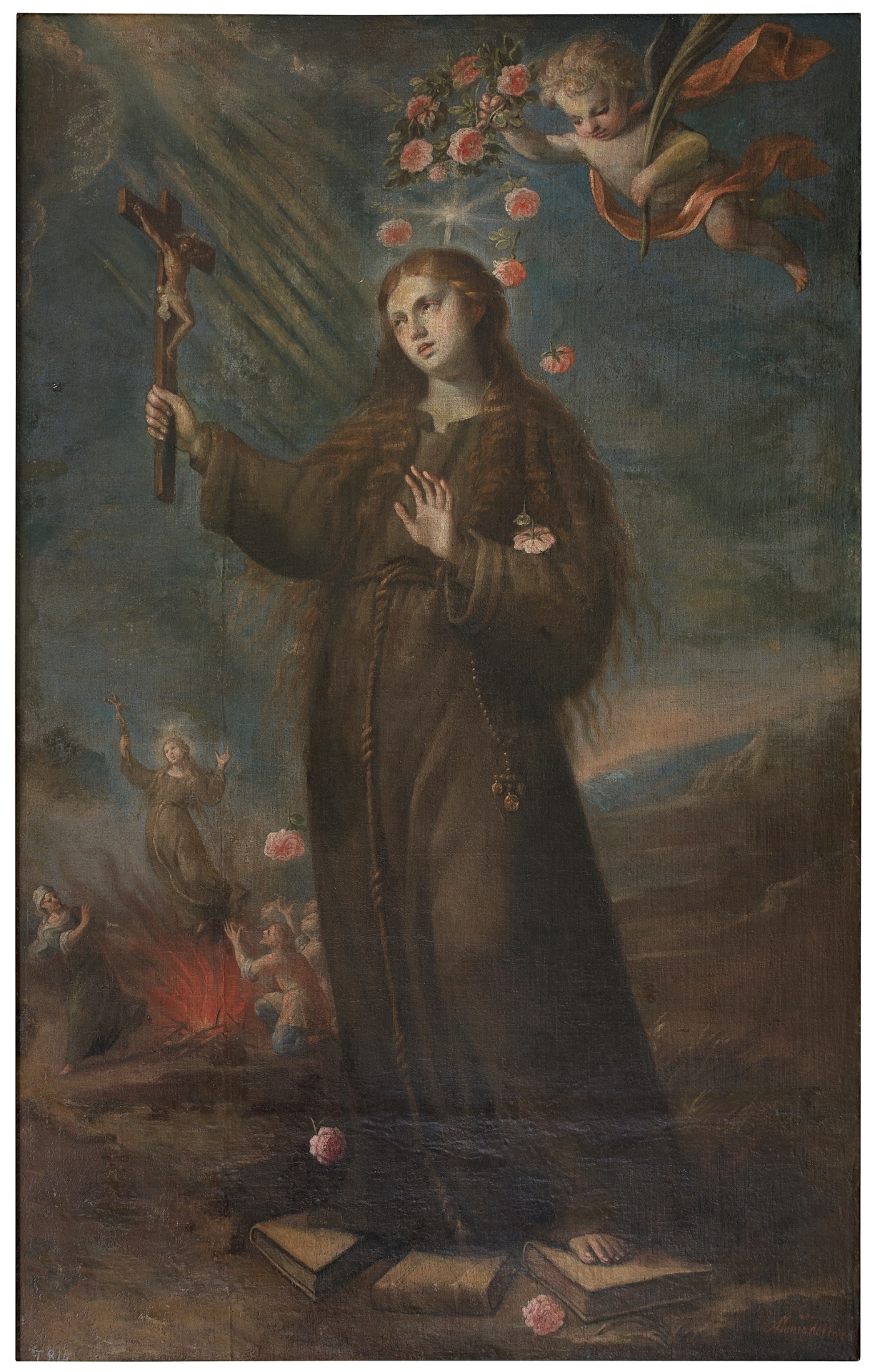 La obra representa a la religiosa franciscana italiana Santa Rosa de Viterbo (1234-1252).